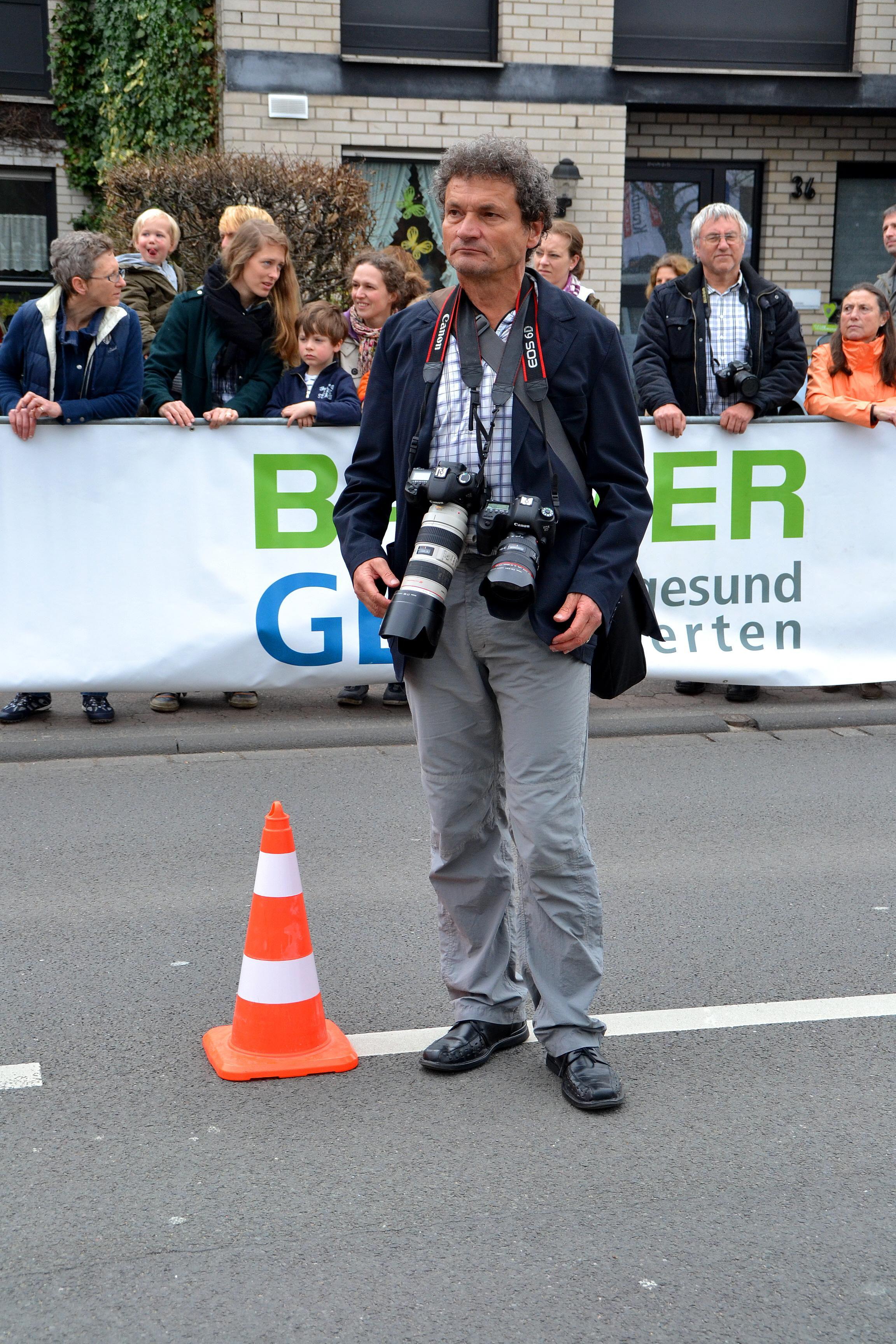 DM HM 2013 Refrath